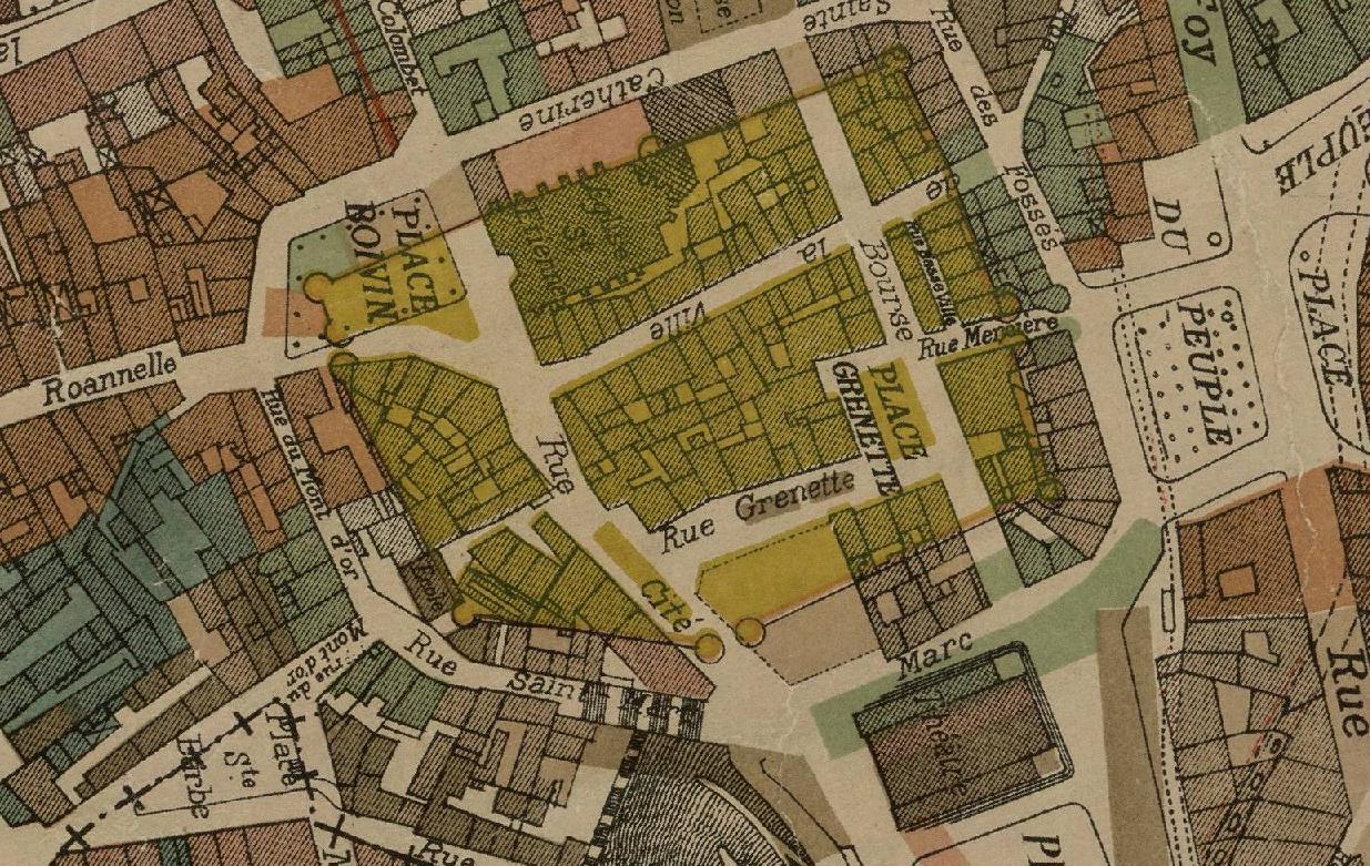 Périmètre de l'ancienne cité fortifiée de Saint-Etienne apparaissant sur un plan de 1905-1906.